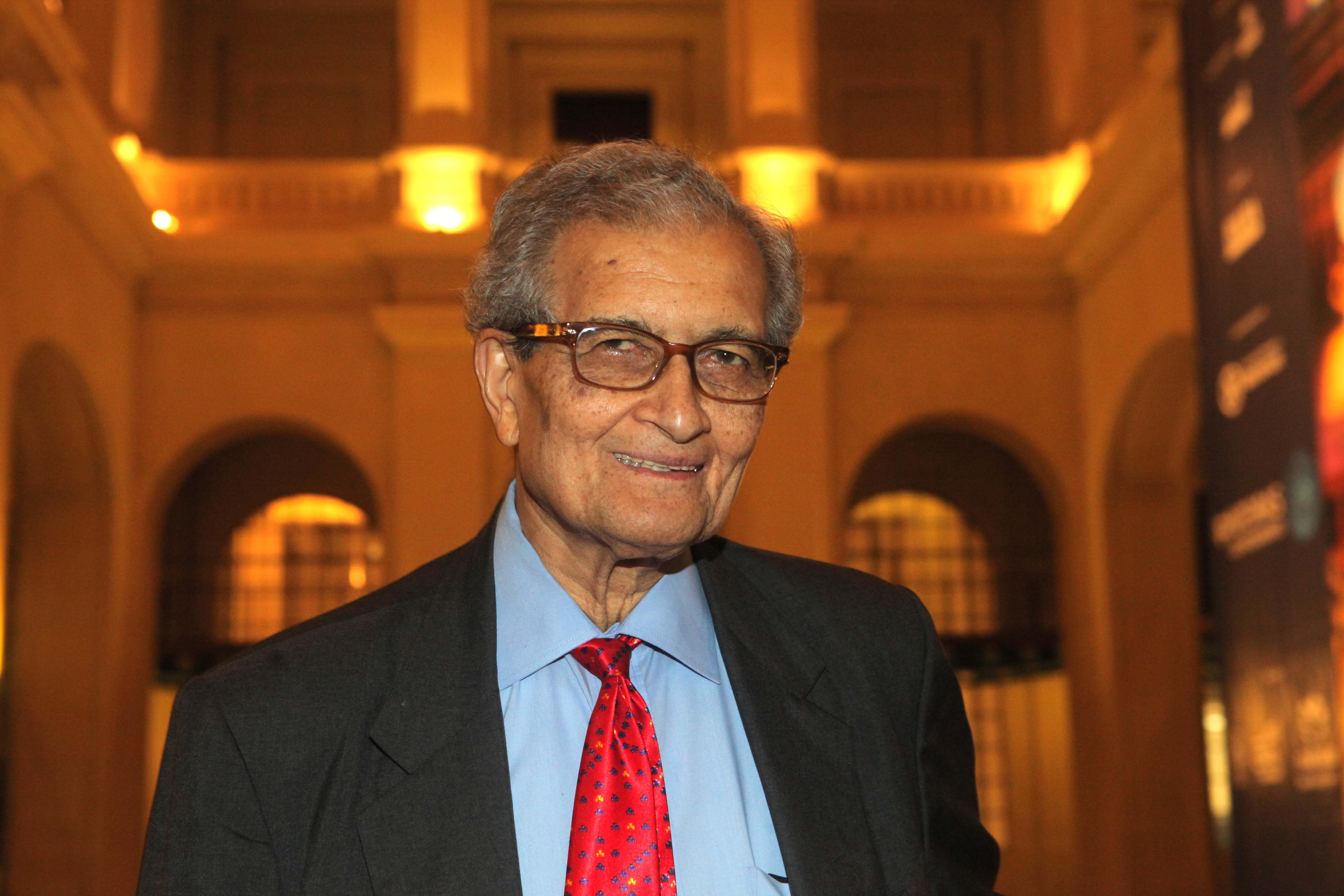 Amartya Sen no Fronteiras do Pensamento São Paulo 2012